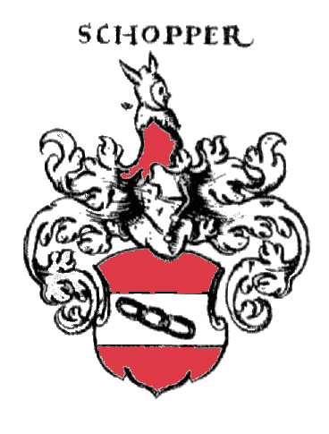 Wappen der Nürnberger Patrizierfamilie Schopper